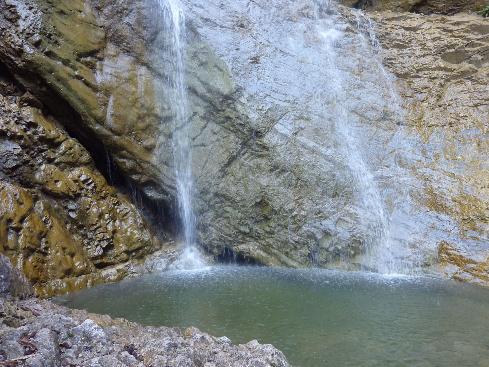 der Schleierfall bei Bad Hindelang, ein Wasserfall des in die Ostrach mündenden Ellesbaches